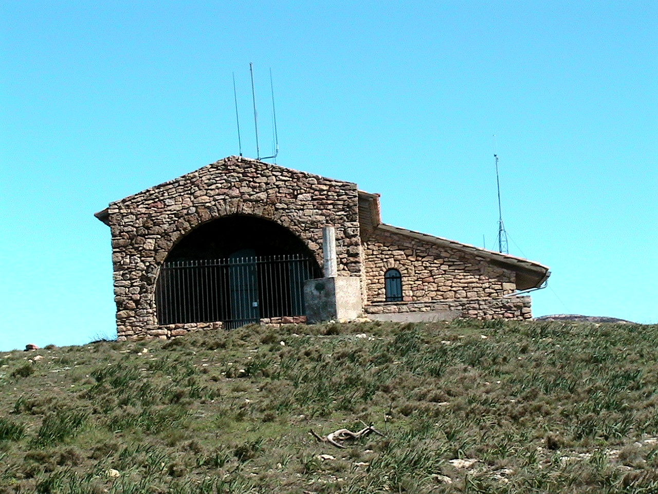 Ermita de Sant Mamet, amb un refugi lliure anexe, al cim de la muntanya de Sant Mamet, excelent mirador del Montsec de Rúbies This is a a photo of a natural area in Catalonia, Spain, with id: ES510192